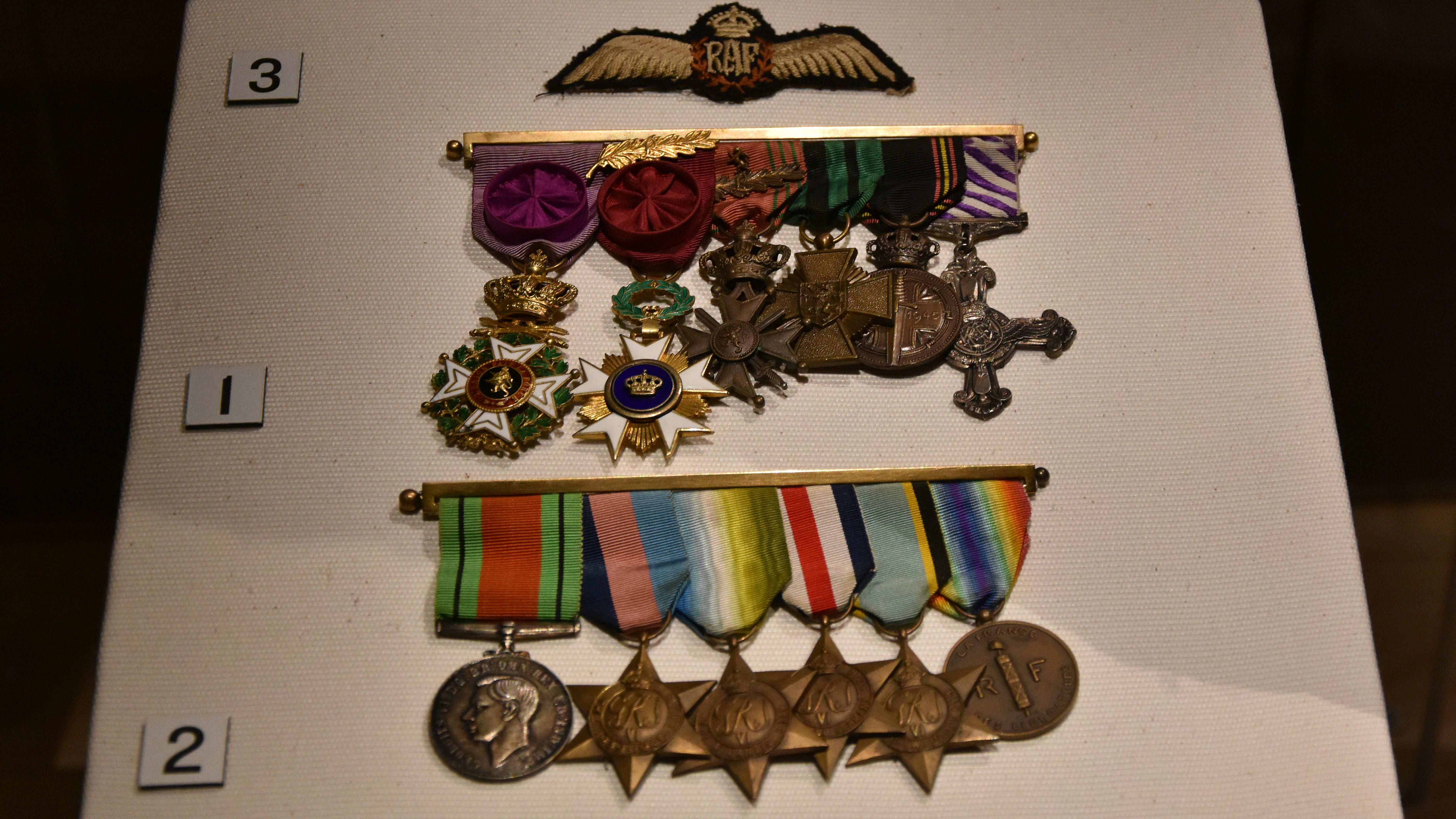 Paul Cooreman Seafront (Zeebrugge) 25-06-2019 16-13-32